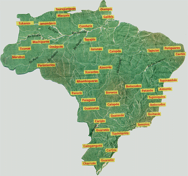 O mapa descreve algumas etnias conhecidas no território brasileiro.